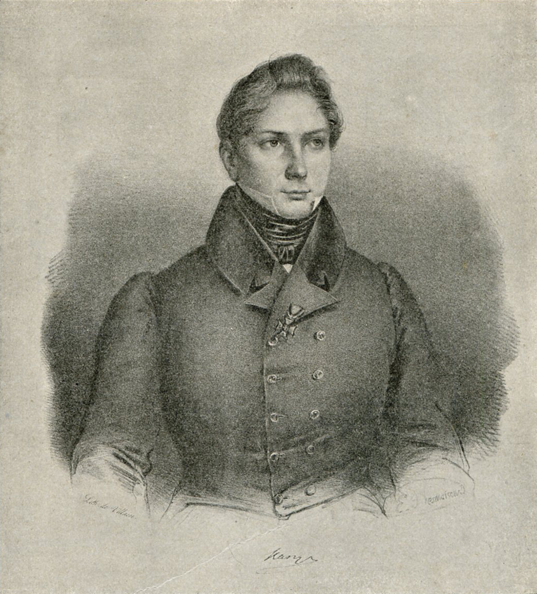 Беларуская (тарашкевіца): Партрэт Юзэфа Кашыца (Juzef Kašyc)